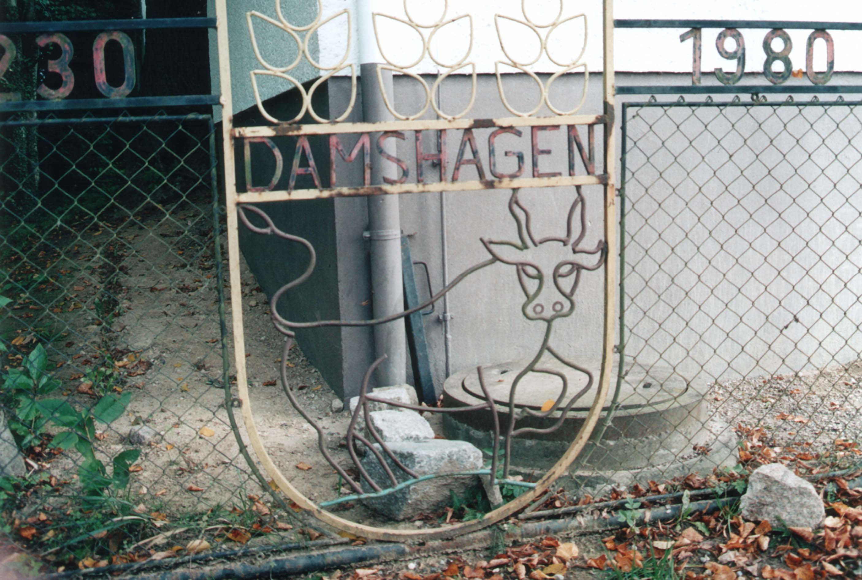 Altes Wappen Damshagens vor dem vormaligen Plessengutshaus Datum: 10/2003 Urheber: Michael Pfeiffer alias Gordito1869 Quelle: privates Fotoalbum